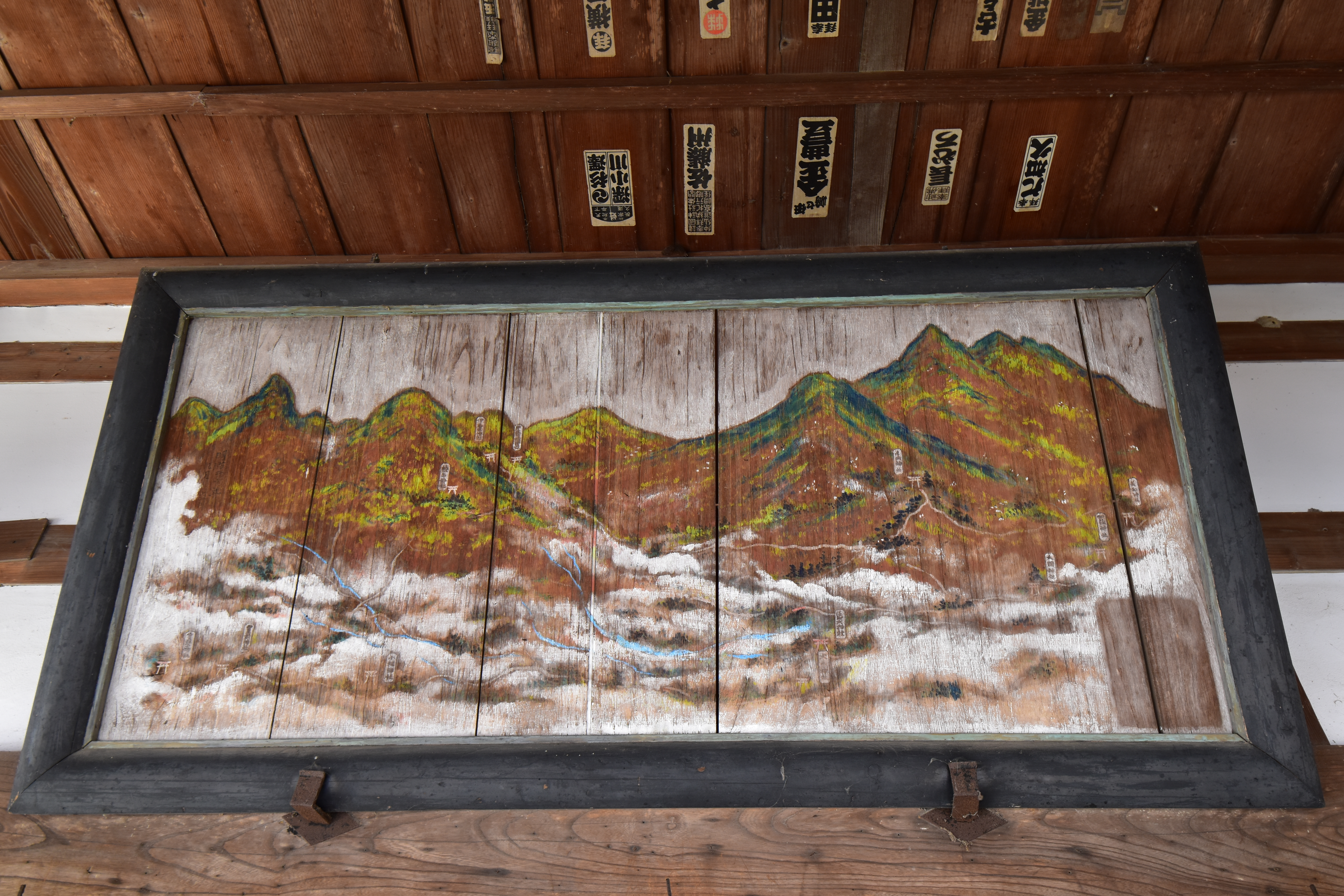 群馬県伊勢崎市に鎮座する倭文神社の扁額